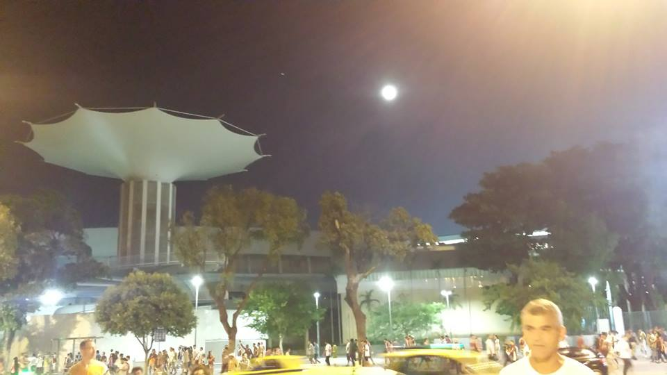 Torcida do Fluminense saindo do Maracanã contra o Liverpool (URU), aspecto externo do estádio.